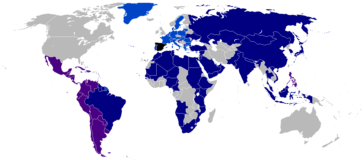 Expo 2008 de Zaragoza. Países participantes. Resaltados los grupos a los que pertenece España: Hispanidad y Unión Europea.